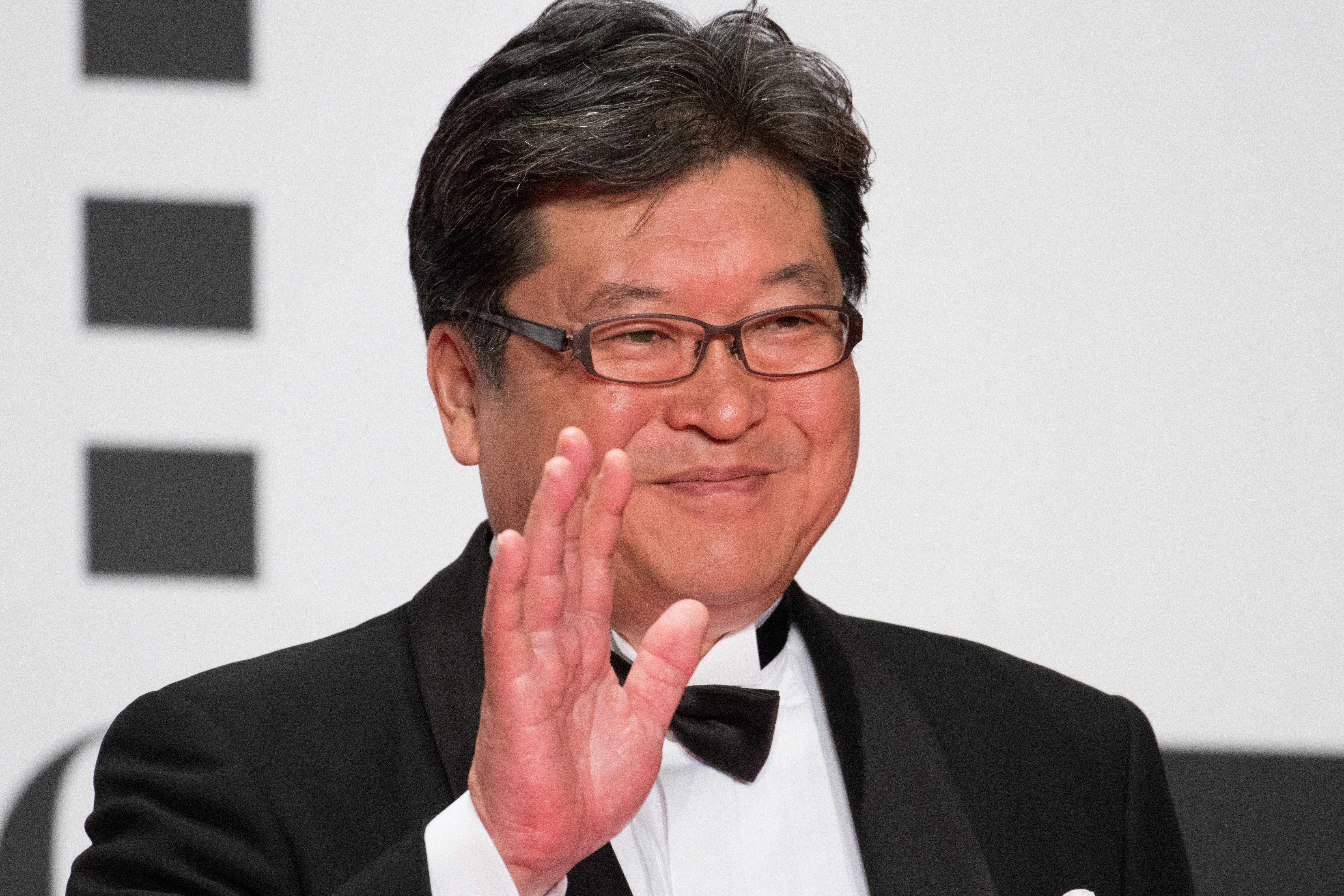 第29回 東京国際映画祭 オープニングセレモニー 萩生田光一